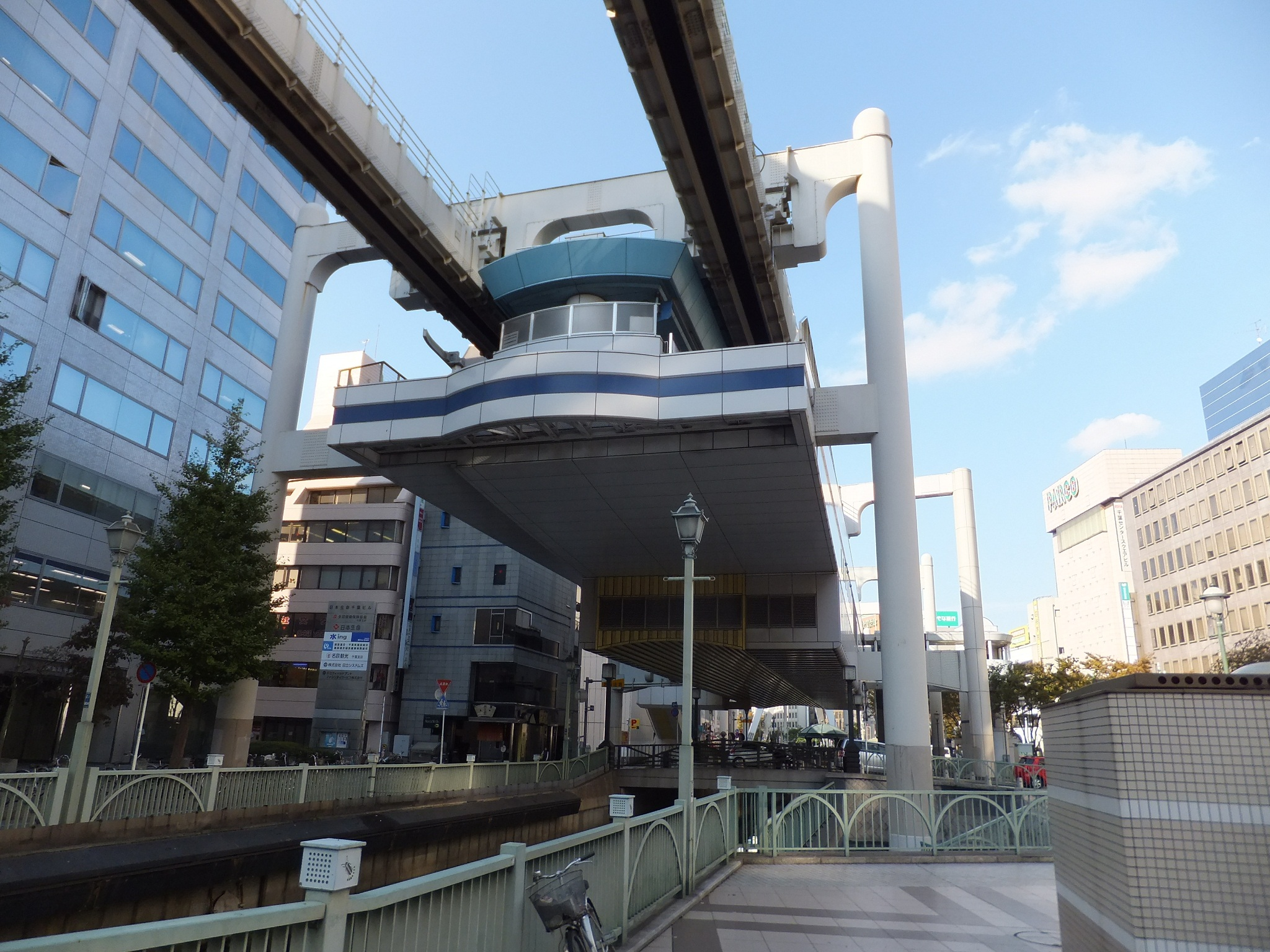 千葉都市モノレール葭川公園駅南側から